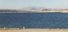 Lake Mead, Arizona